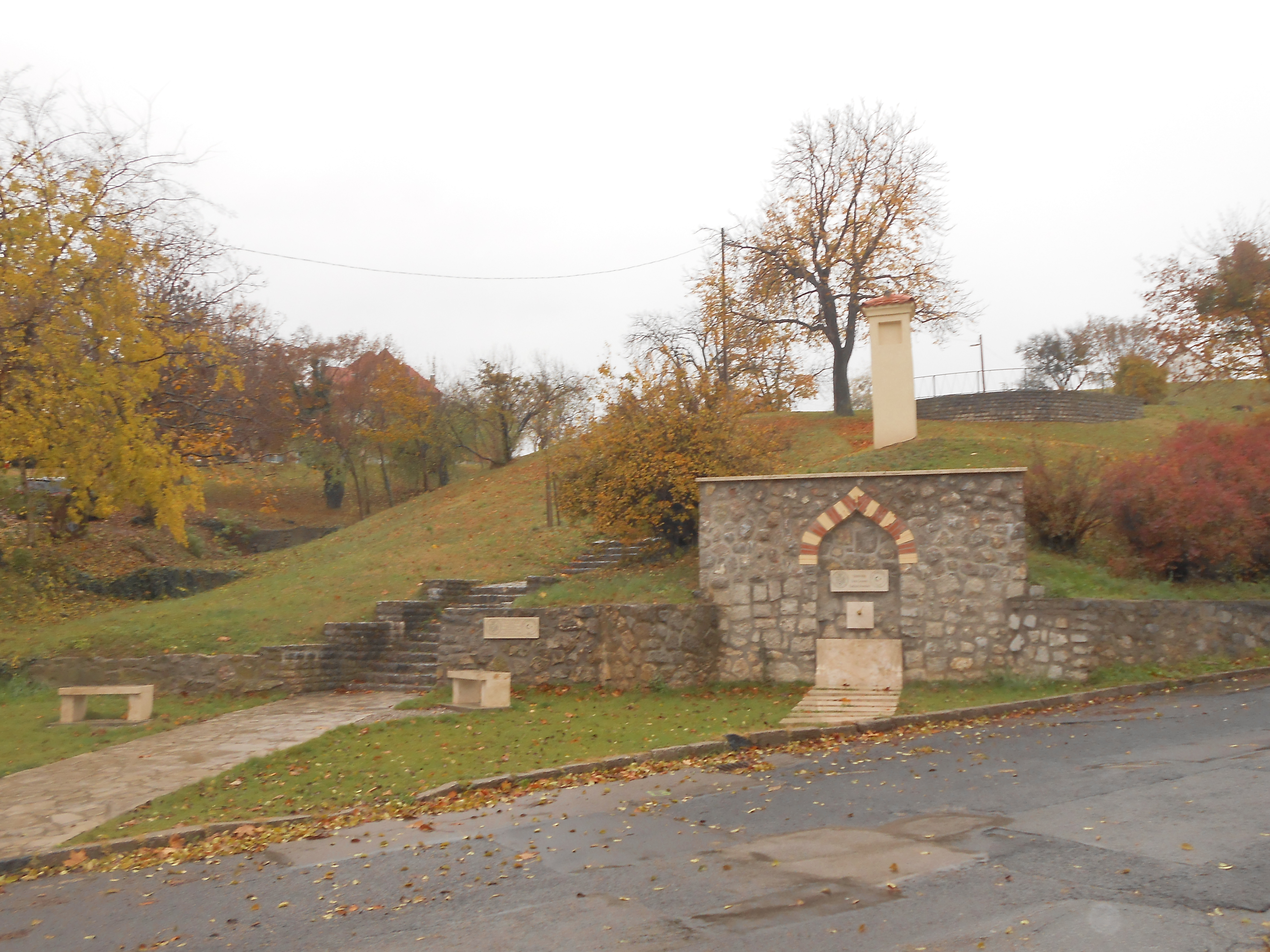 Rókus-forrás, Pécs 2016 őszén